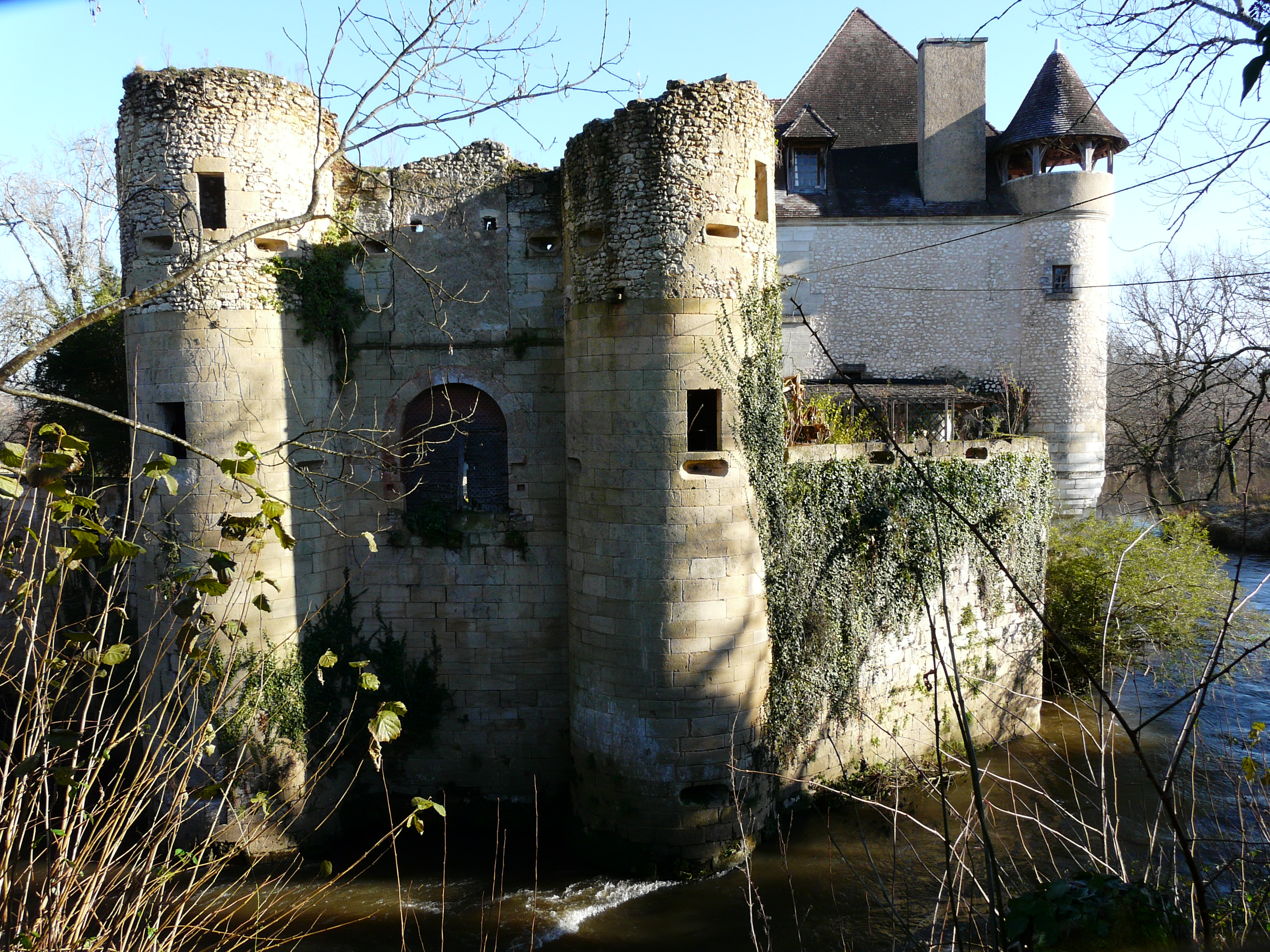 Le château de Rognac vu depuis le sud-ouest, Bassillac, Dordogne, France